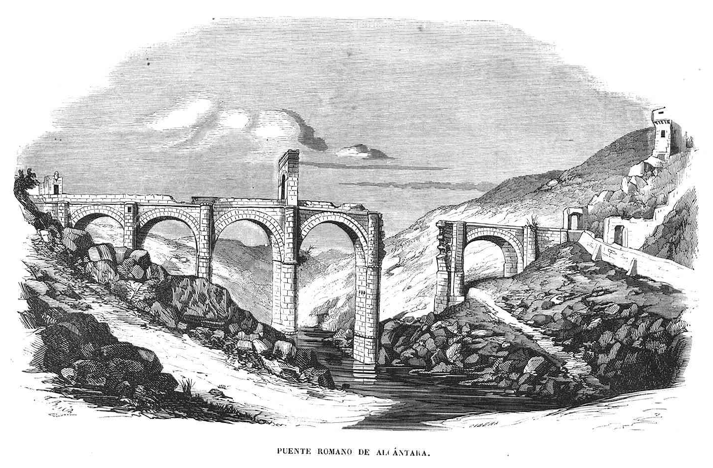 Puente romano de Alcántara, en la revista española El Museo Universal.